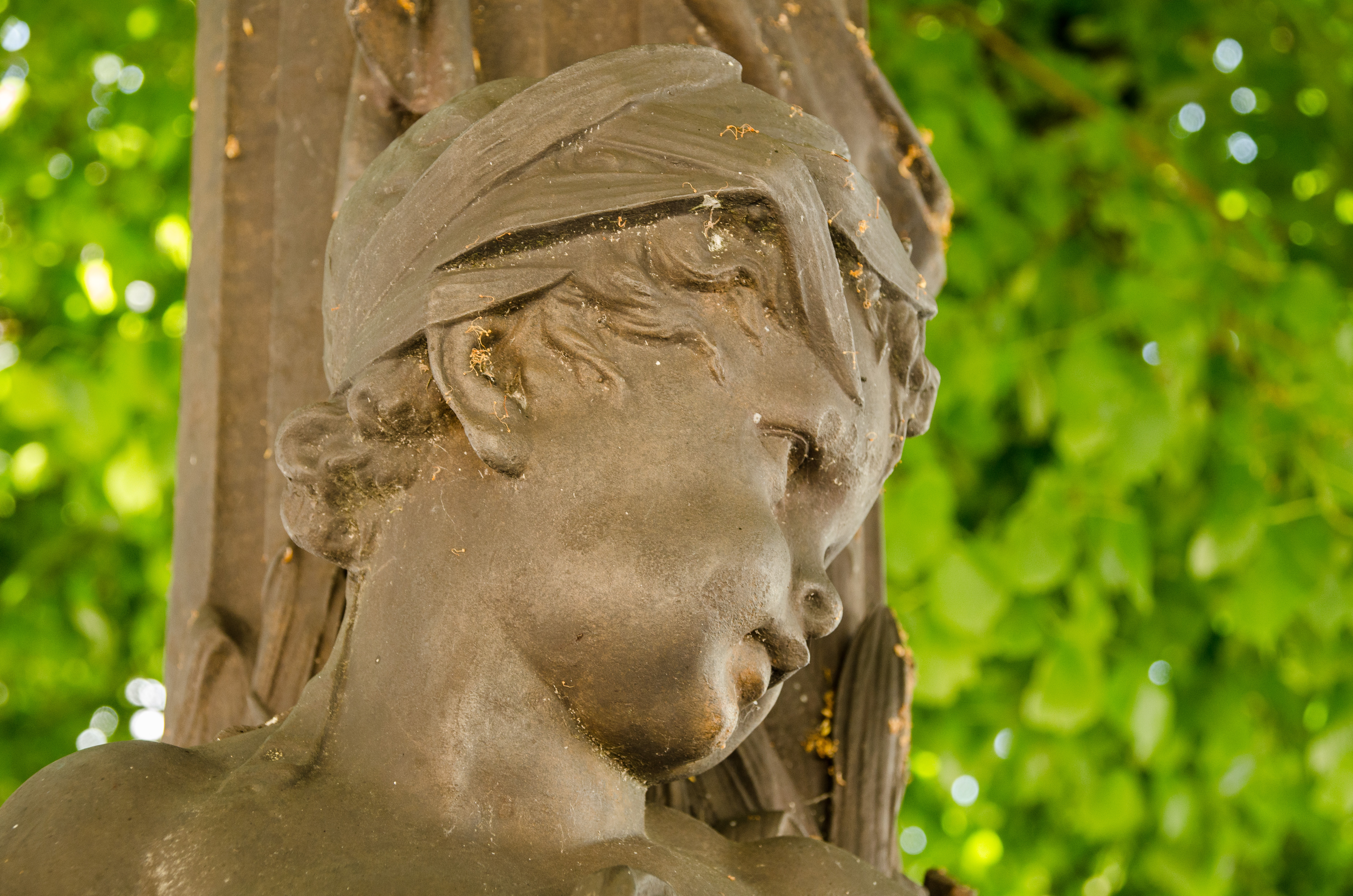 Photo d'un détail de la fontaine du vieux Bourg à La Celle Saint Cloud